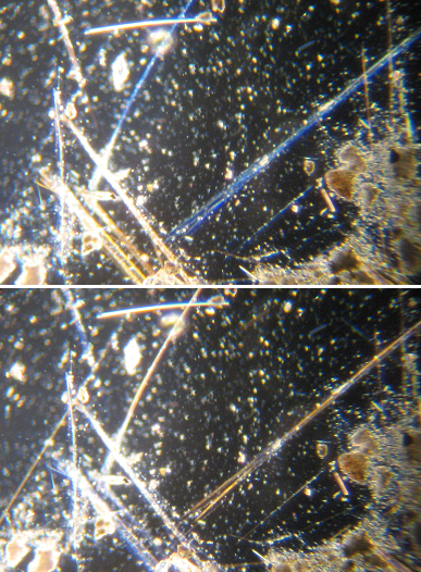 Amosietvezels, ingebed in een kleurvloeistof en belicht met een polarisatiefilter.